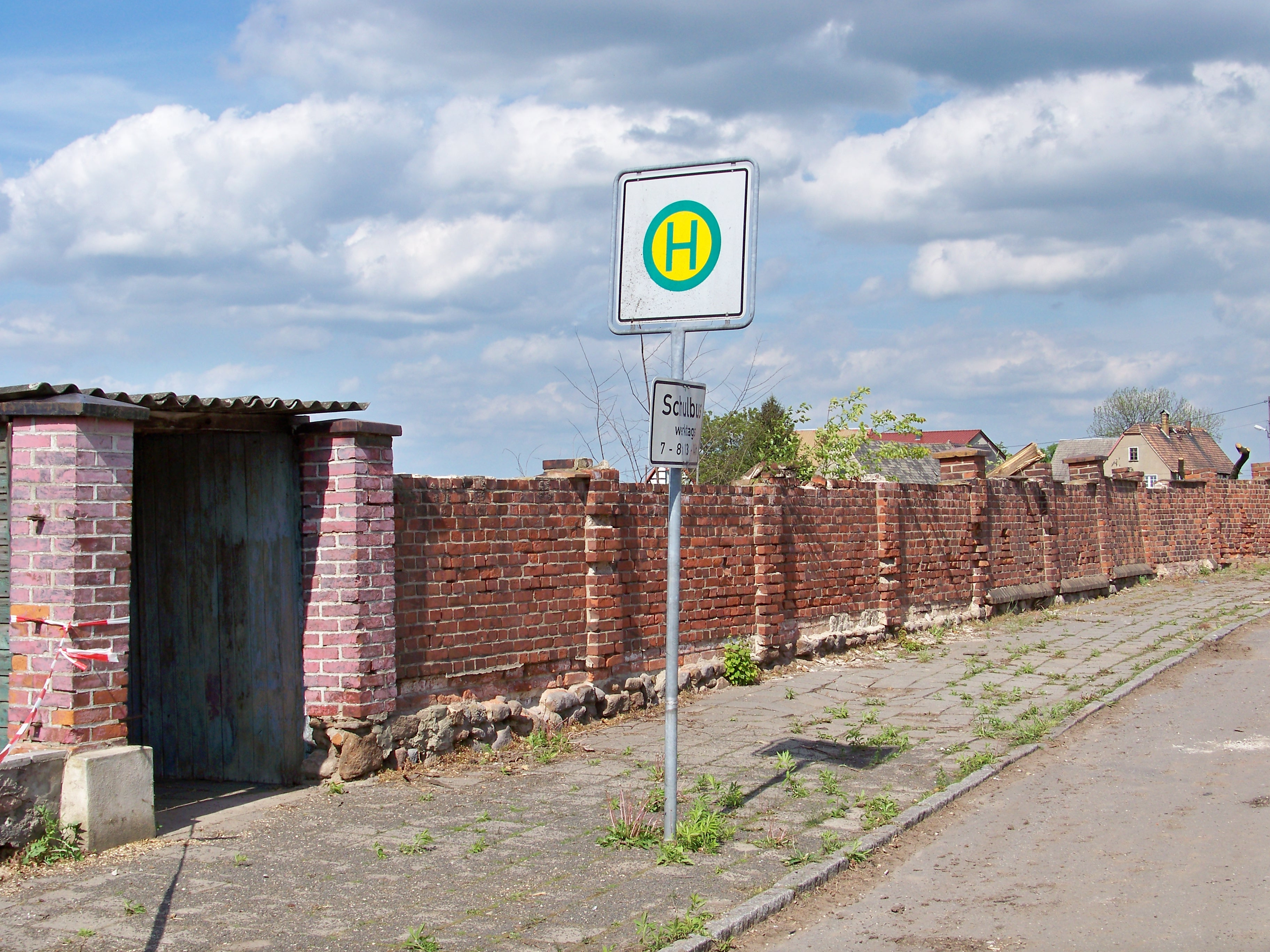 Hier hält auch kein Schulbus mehr: Ehemalige Haltestelle für Schulbusse in Heuersdorf.